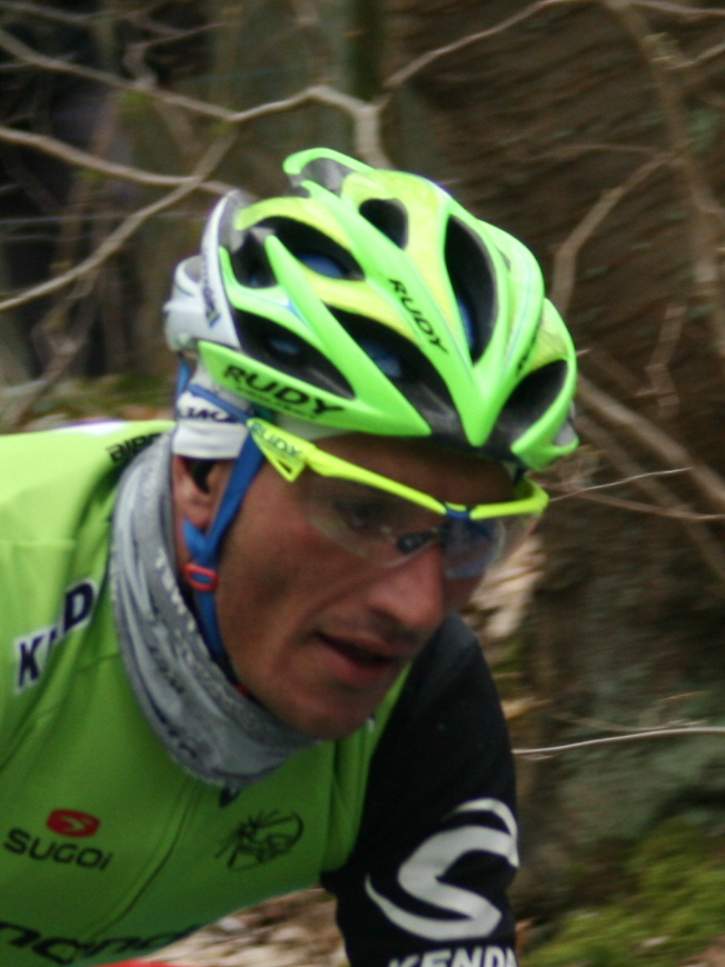 Gent-Wevelgem 2013, Kemmelberg